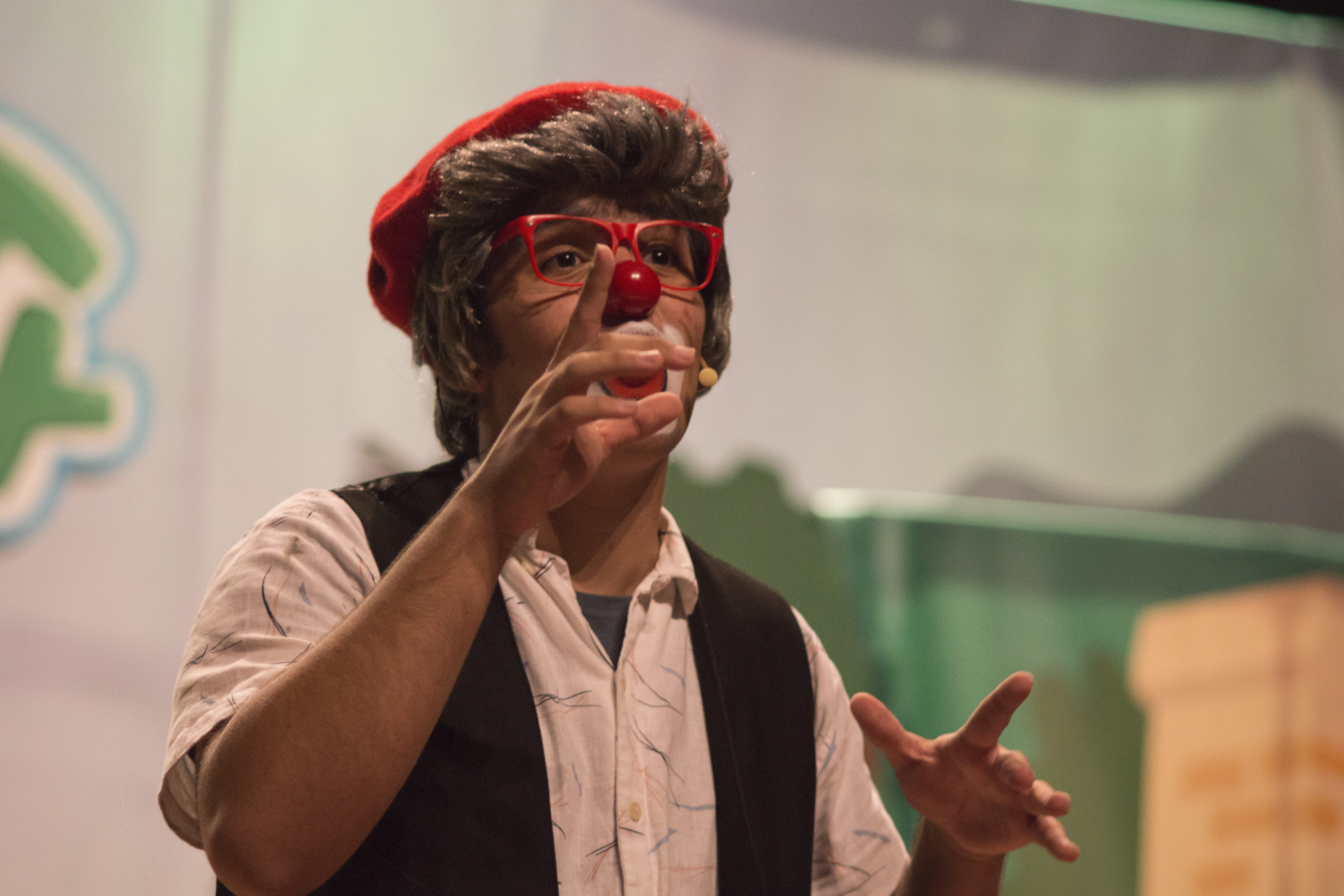 OSABA